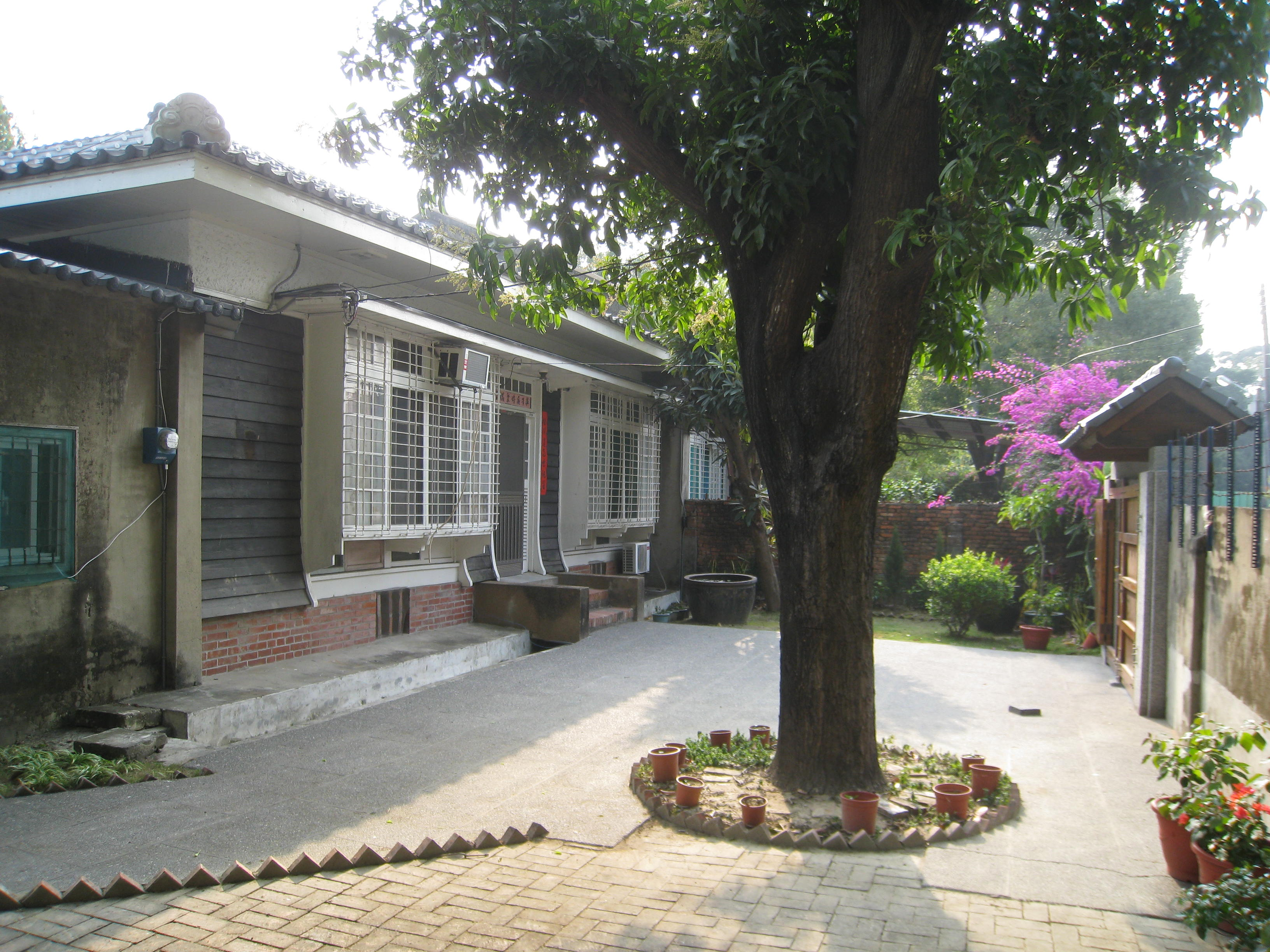 郭柏川台南故居